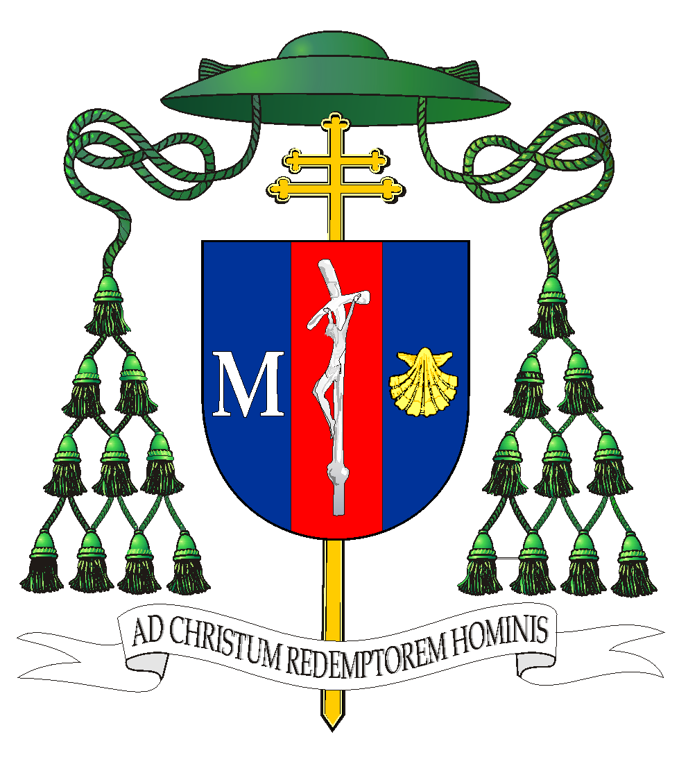 herb abp Wacława Depo, arcybiskupa metropolity częstochowskiego